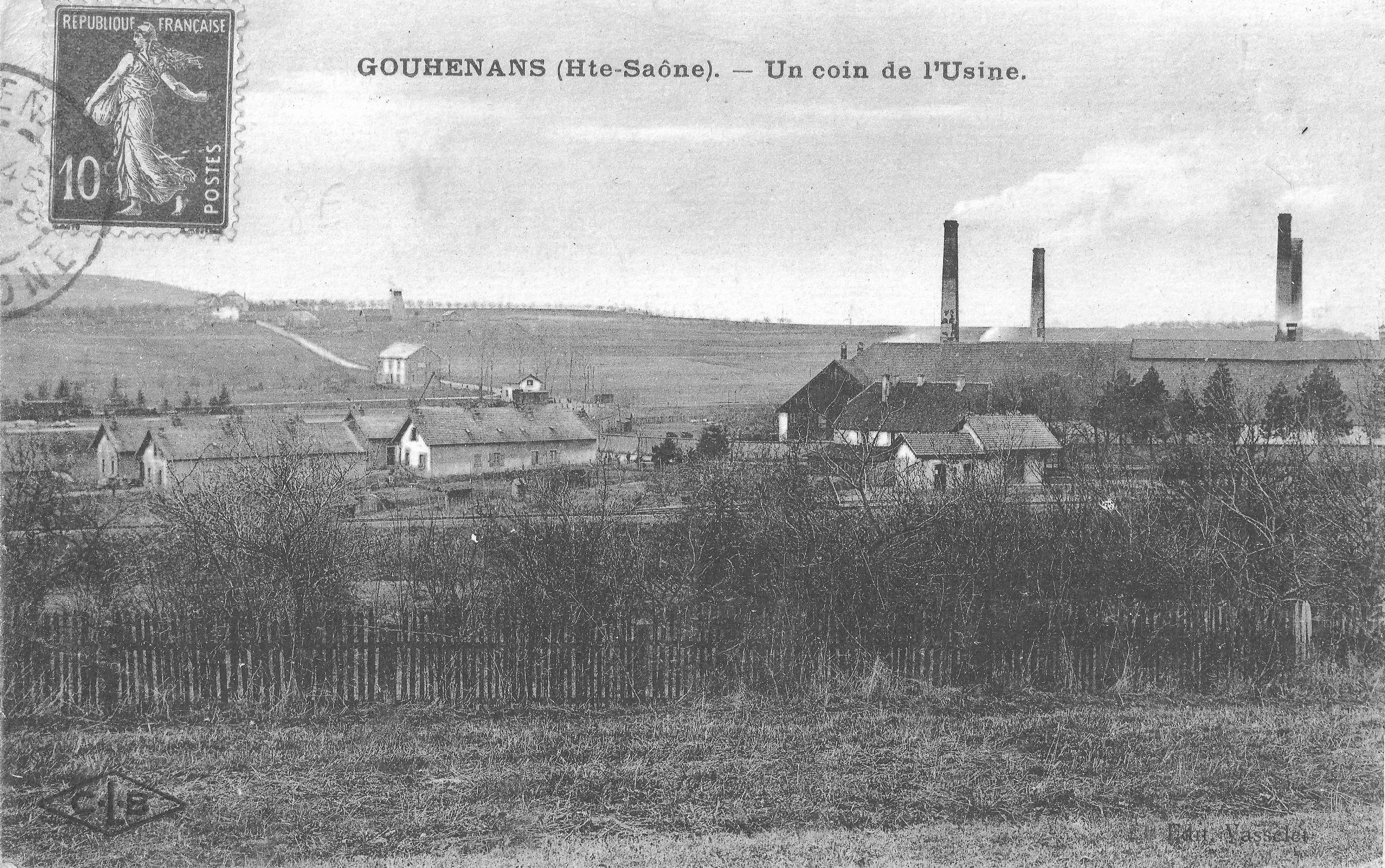 La saline et le puits n° 13 des houillères de Gouhenans.